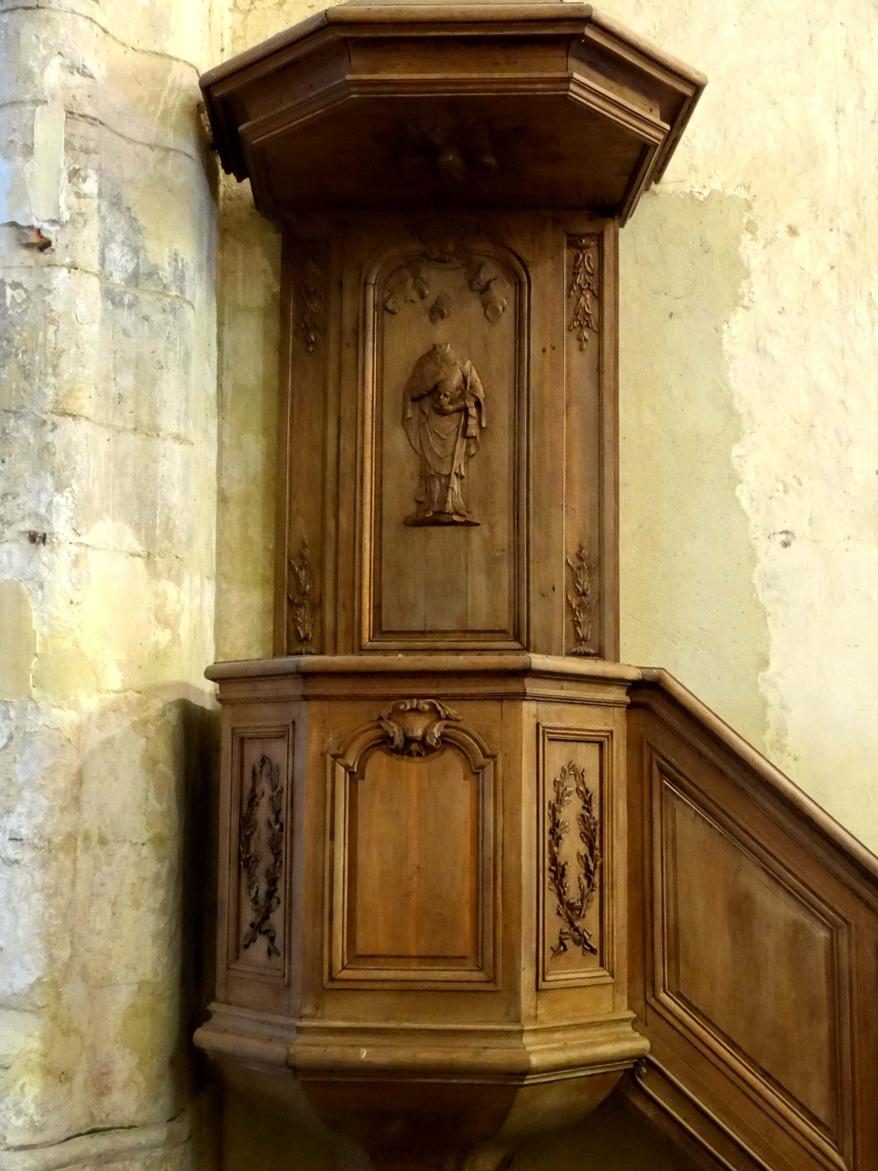 Mobilier de l'église - voir titre.